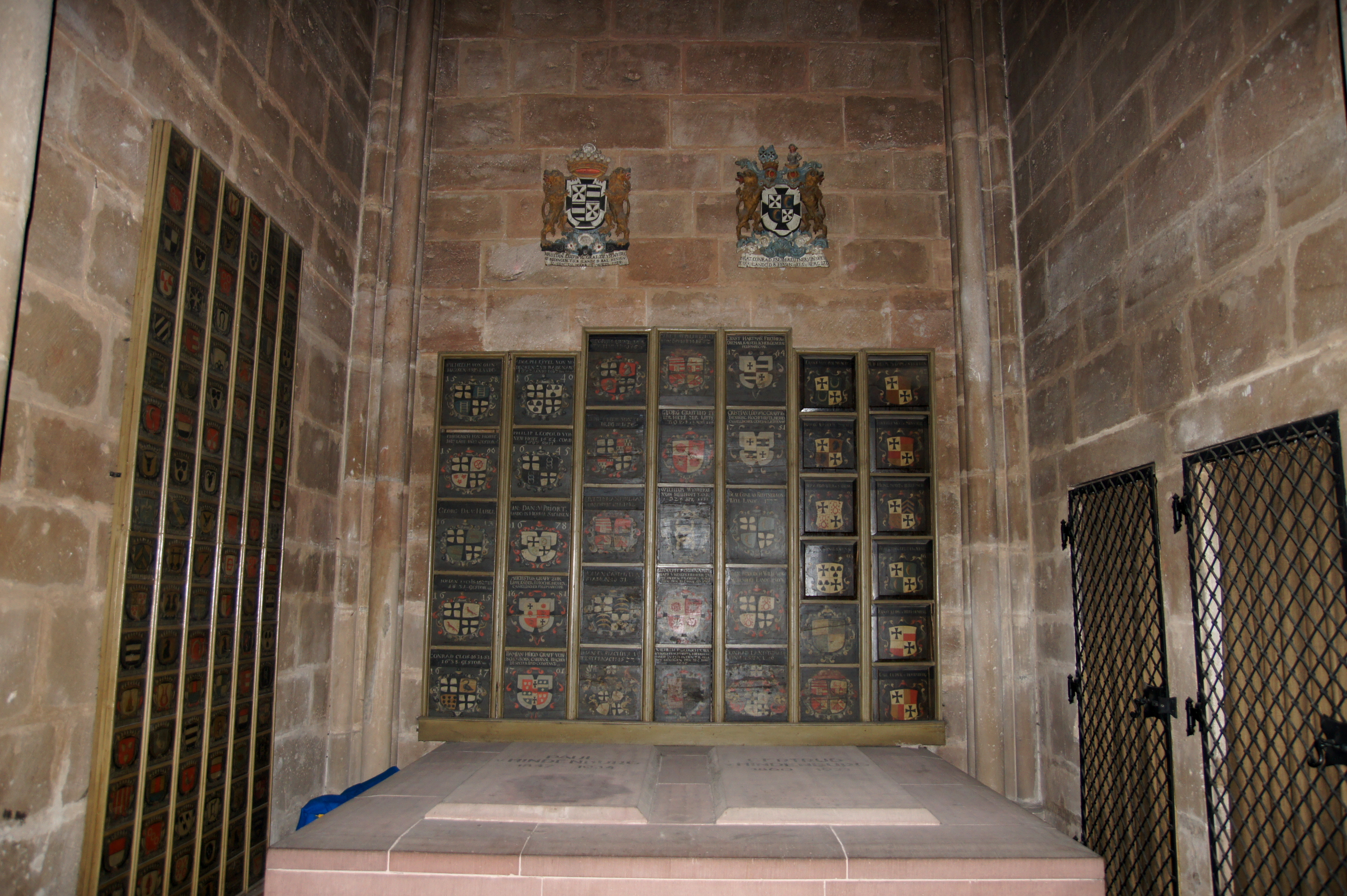 中文（台灣）: 保羅·馮·興登堡墓